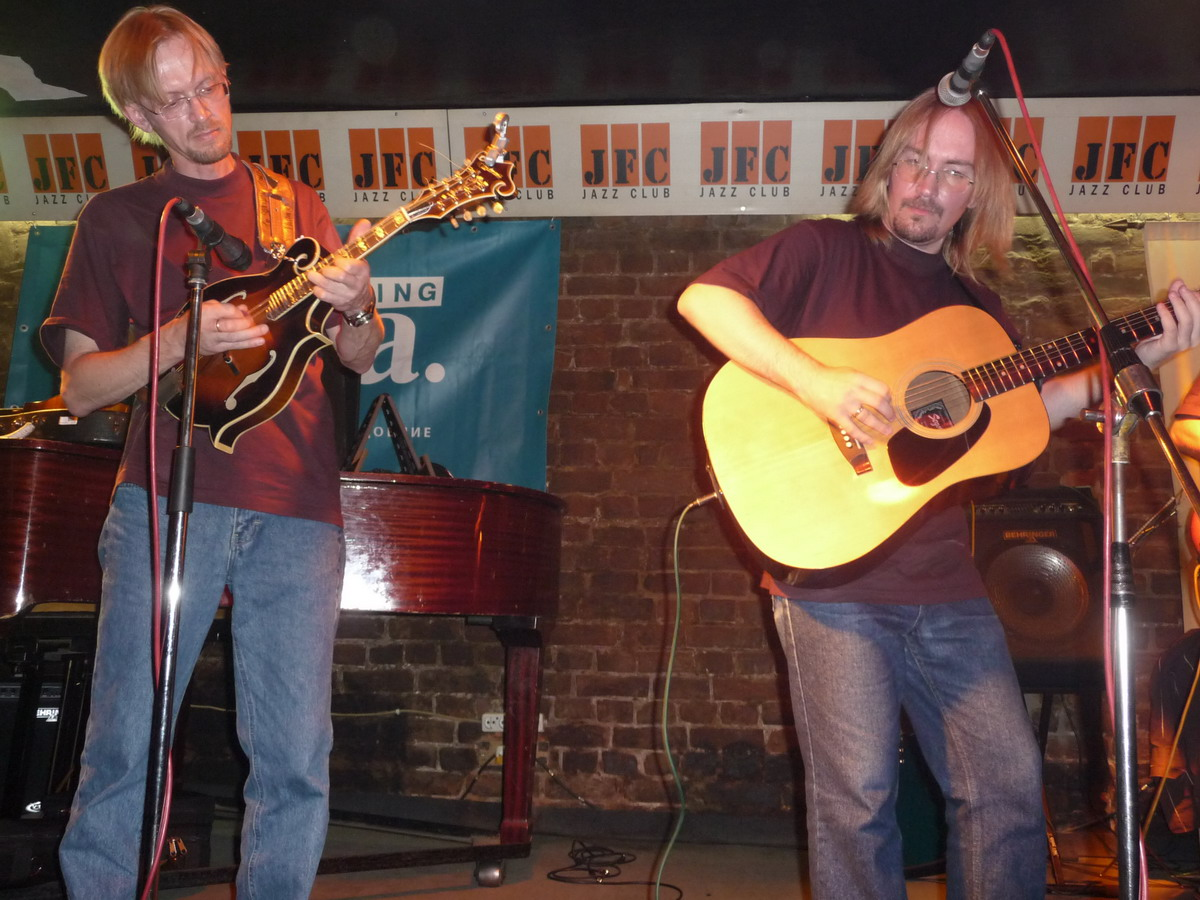 Юбилей группы Finestreet